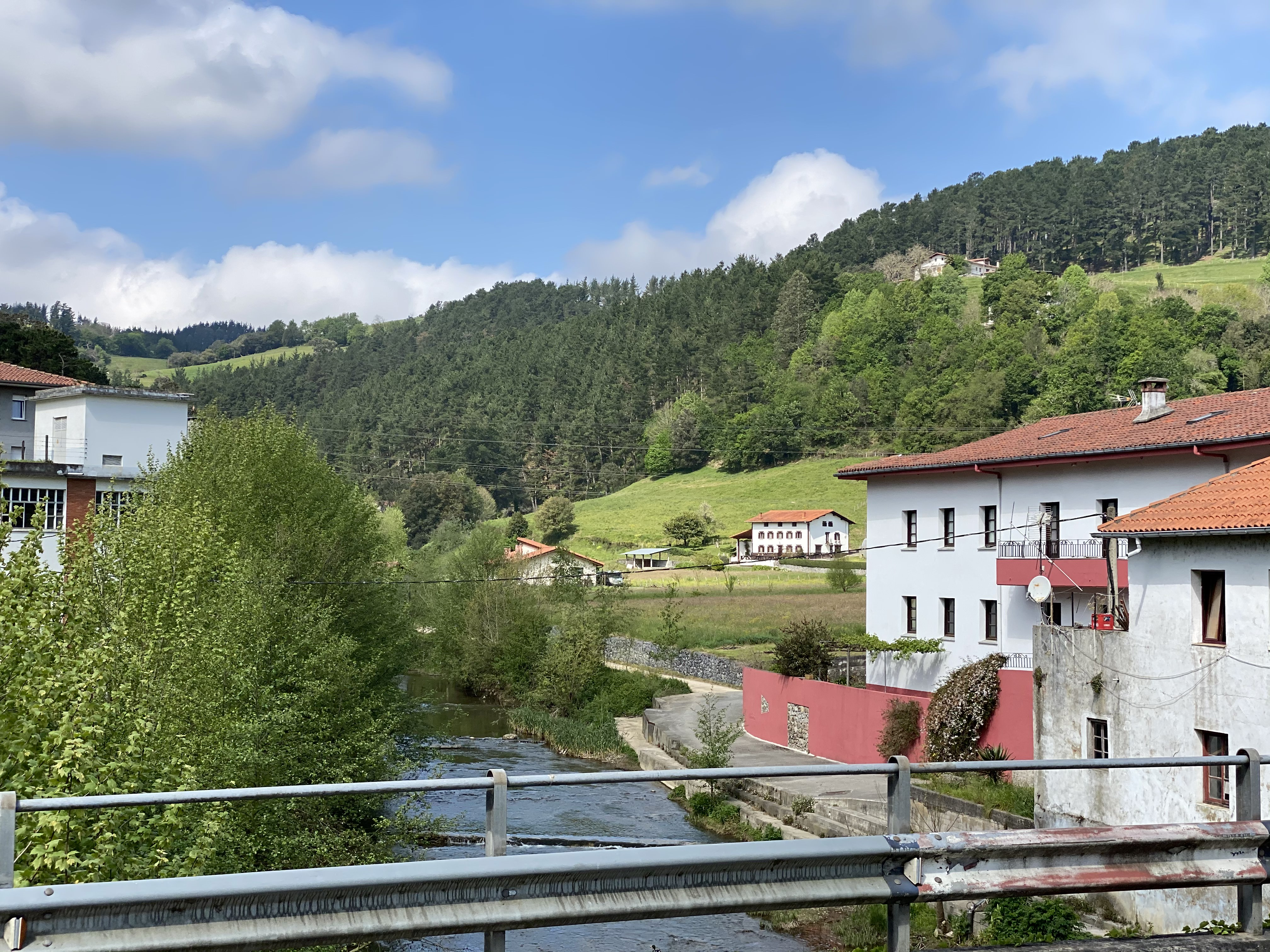 Artibai ibaia Berriatuan